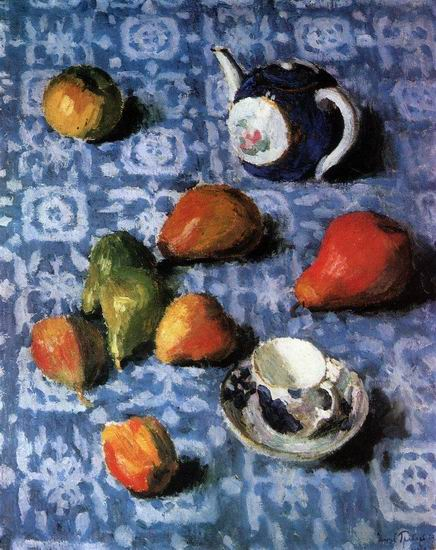 Pears on a blue tablecloth (Груши на синей скатерти), 1915